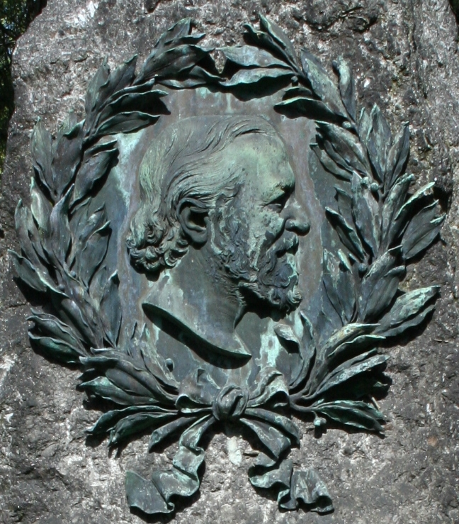 Emil Engelmann (Dichter), Reliefmedaillon von Unbekannt, von Engelmanns Grab auf dem Pragfriedhof, Abteilung 4.